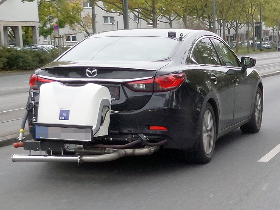 Mazda 6 (GJ) mit Emissionsmesssystem von AVL im Stadtverkehr